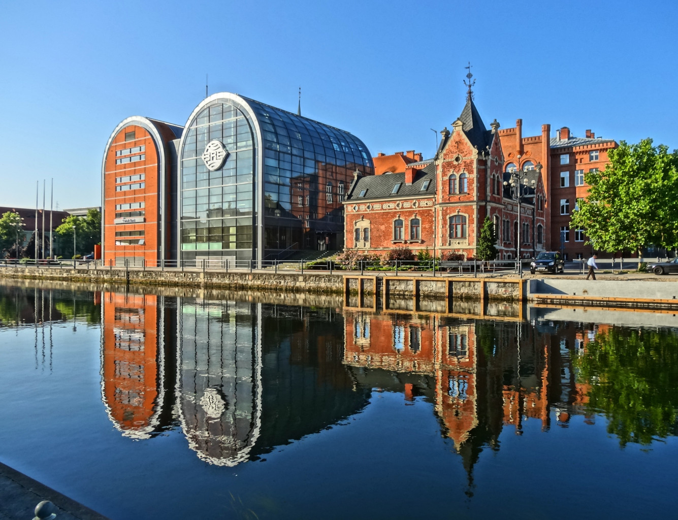 Zespół budynków BRE Banku w Bydgoszczy przy ulicy Grodzkiej, zwanych "szklanymi spichrzami", zbud. w 1998 r.